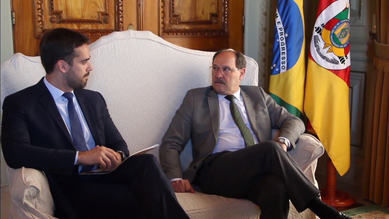 Eduardo Leite e José Ivo Sartori em novembro de 2018.